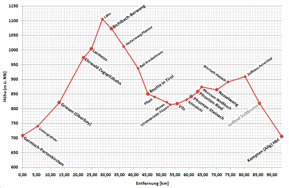 vereinfachtes Höhenprofil der Außerfernbahn